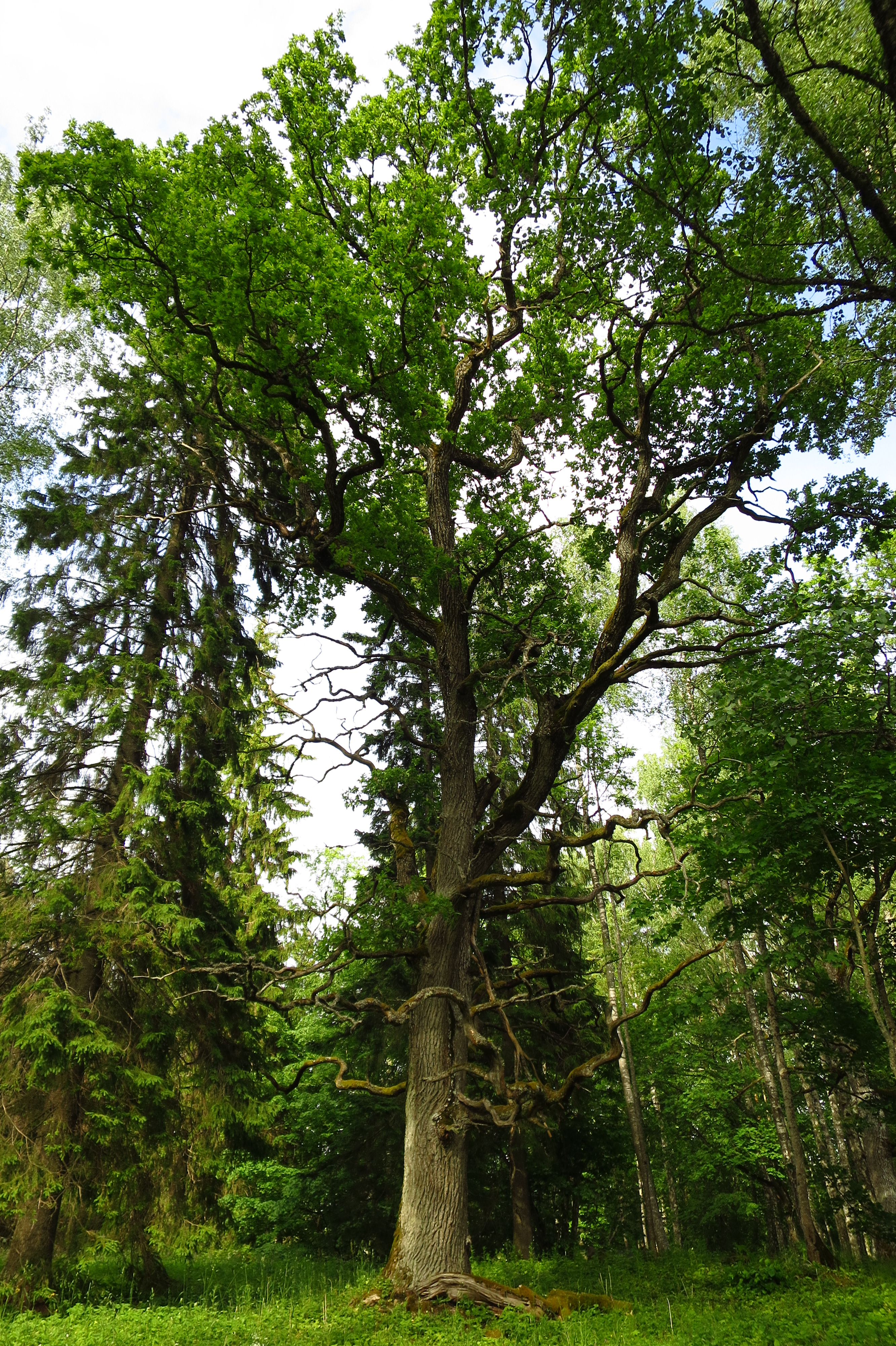 Tamm Rava MKAl